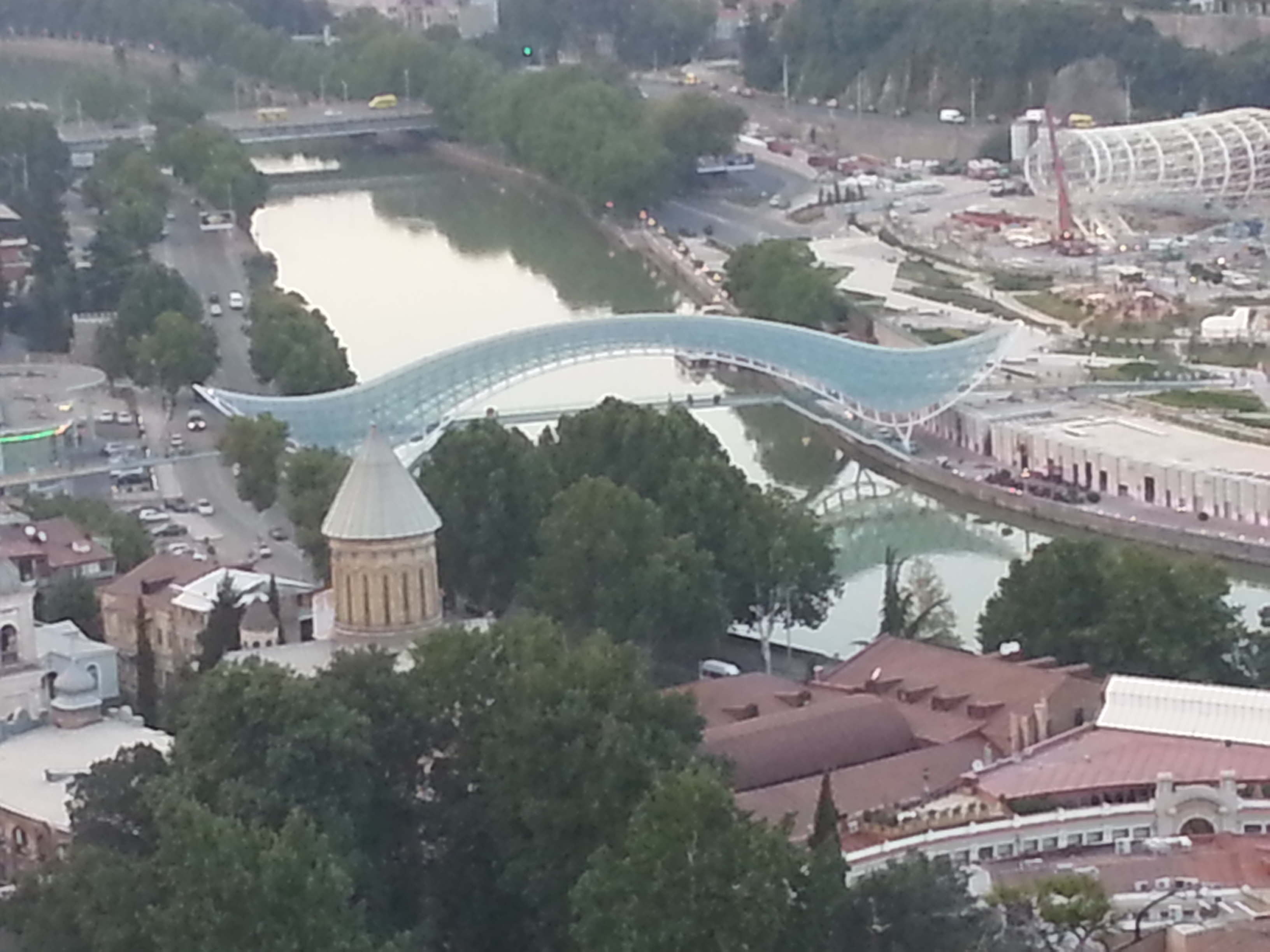 Dzveli Tbilisi, Tbilisi, Georgia